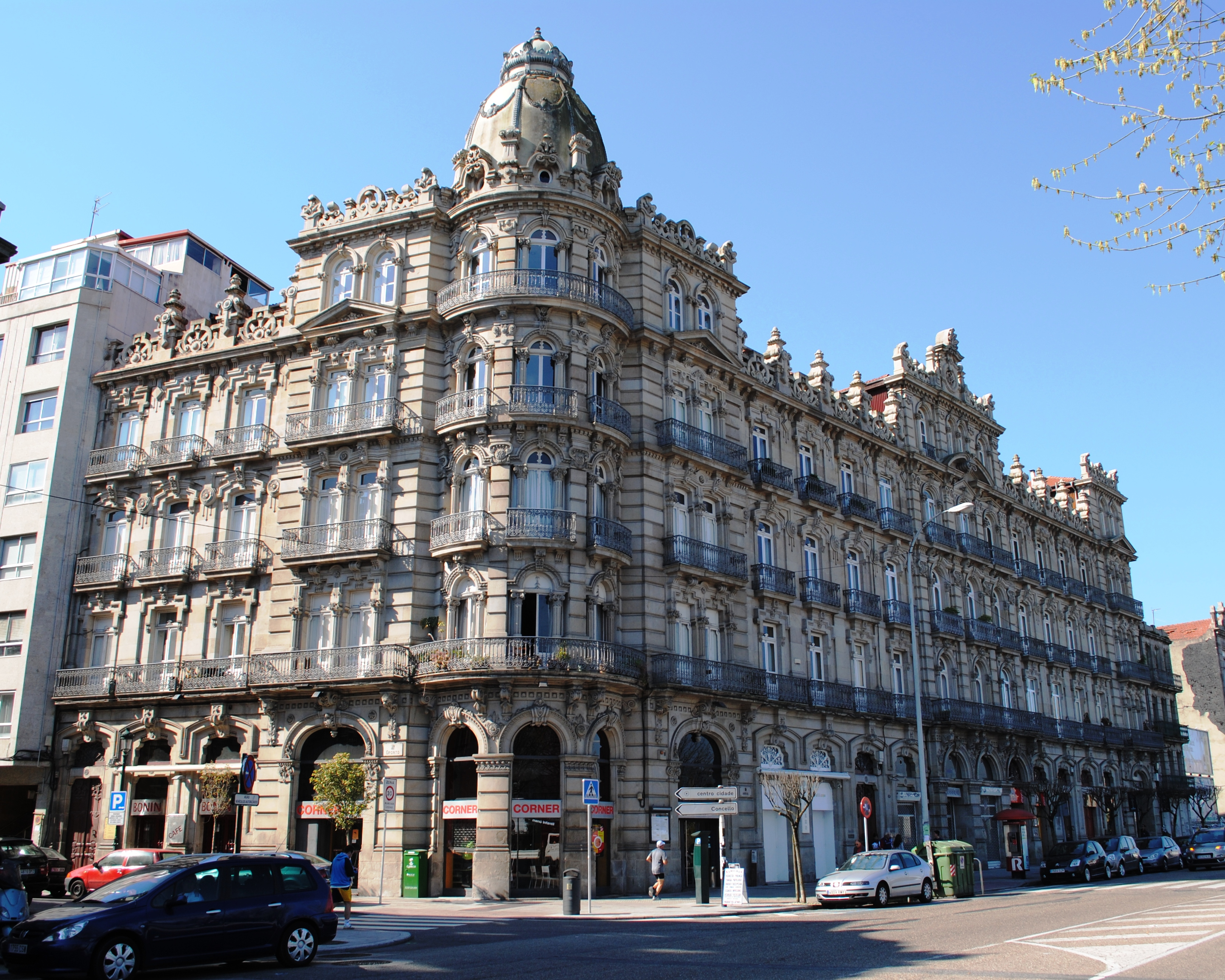 Vigo, Edificio Bonín